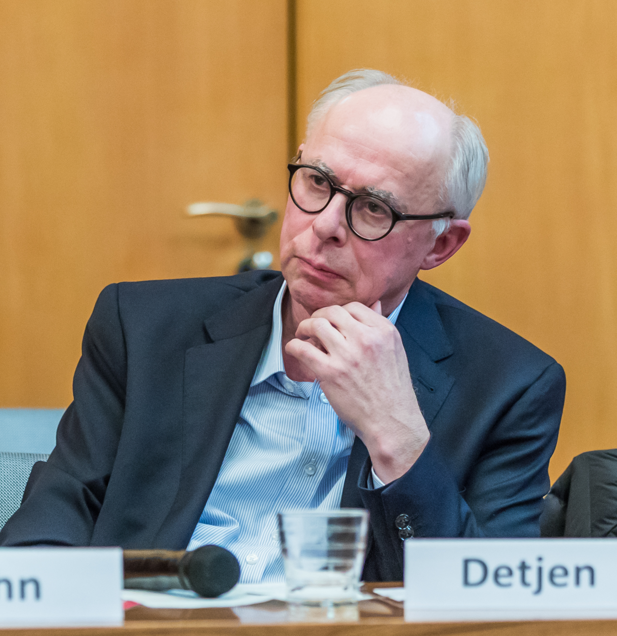 Rathausgespräch zu rechtsstaatlichen Werten im Ratssaal, Spanischer Bau, Rathaus Köln Foto: Jörg Detjen (DIE LINKE)